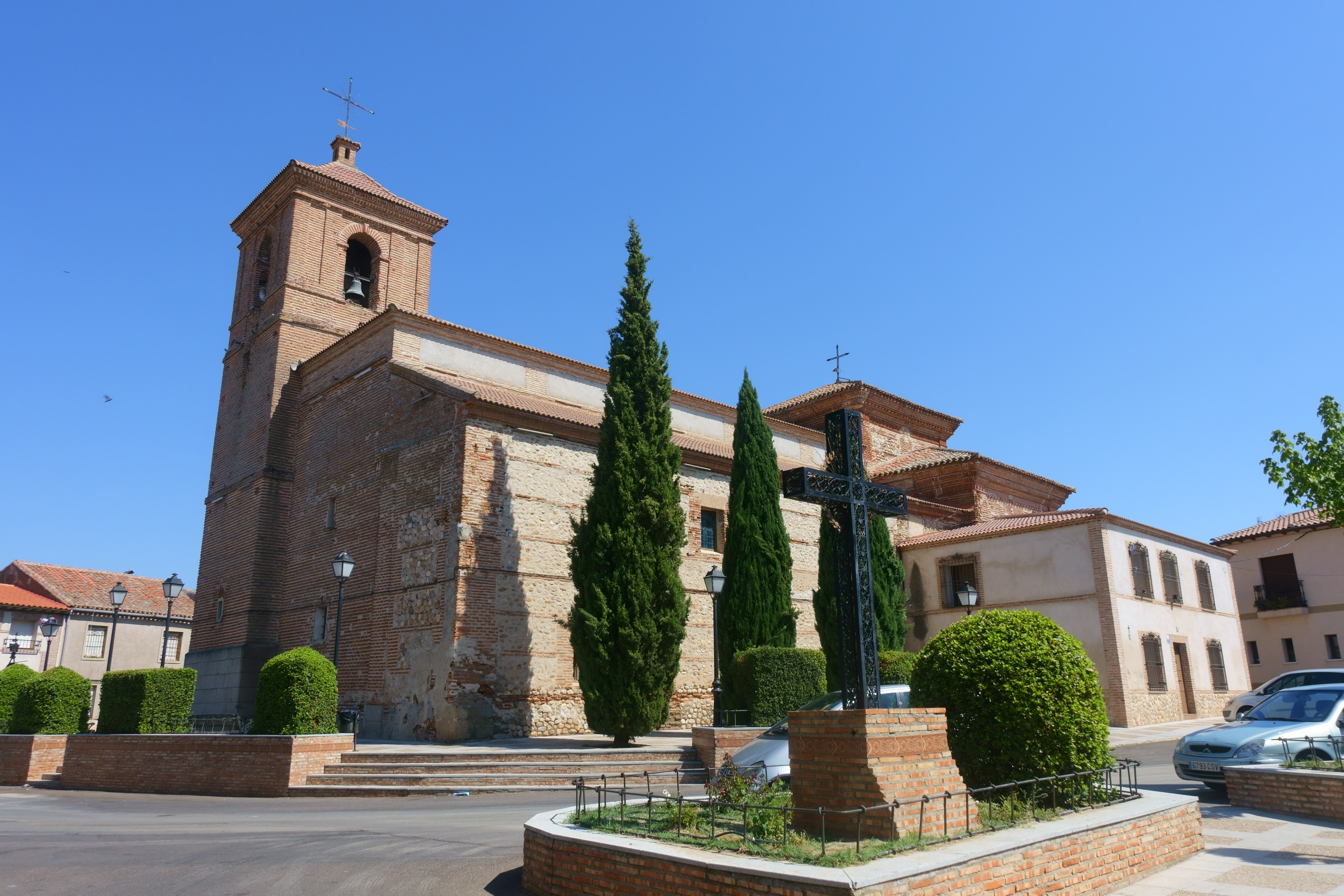 Iglesia de San Julián y Santa Basilisa, El Casar de Escalona (Toledo, España).